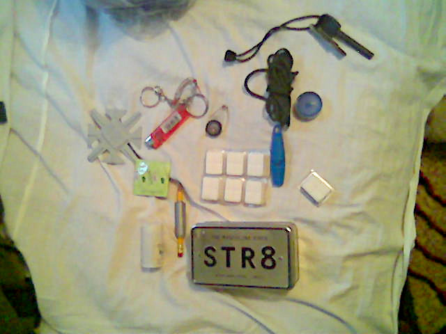 A mini survival kit kept in a medium tin box